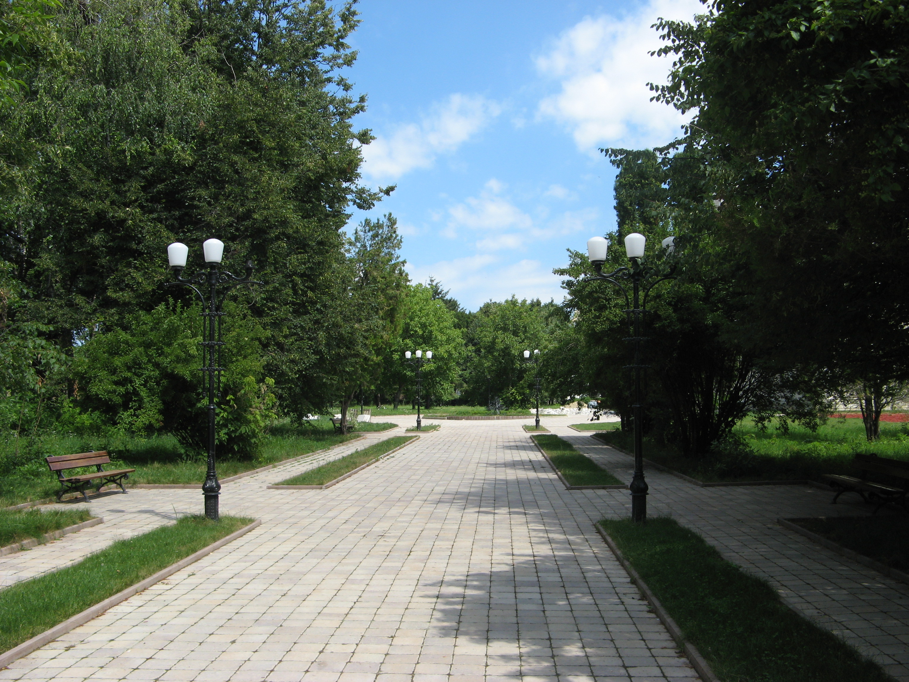 Parc Ruginoasa 03